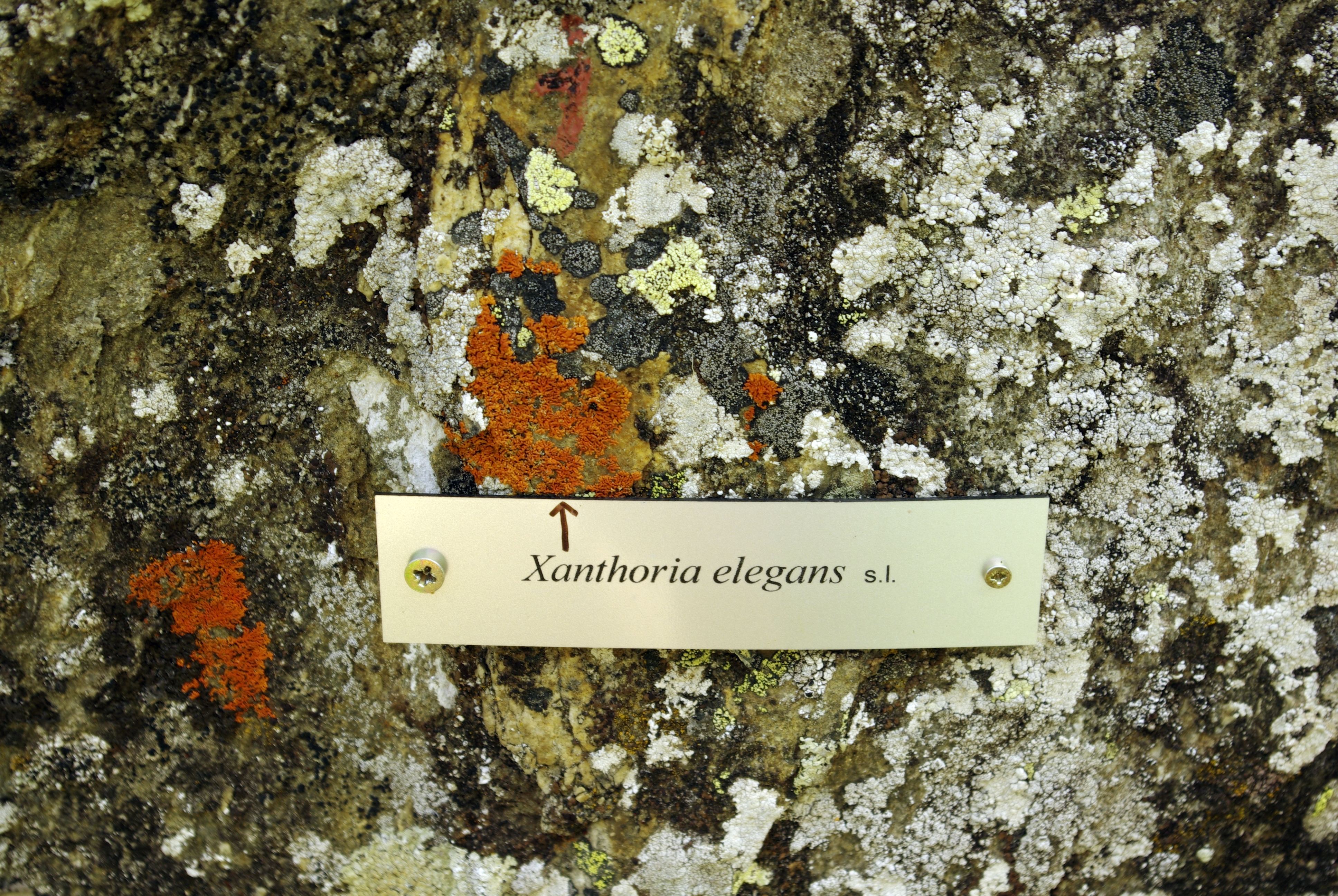 Lichene dell'orto botanico Paradisia - Cogne - valle d'Aosta